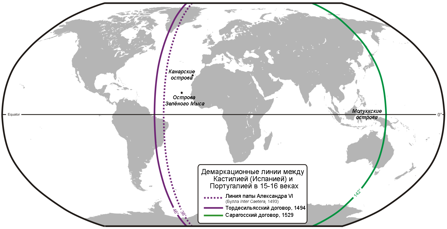 Демаркационные линии между Кастилией (Испанией) и Португалией в 15-16 веках. (Тордесильясский договор and Сарагосский договор)